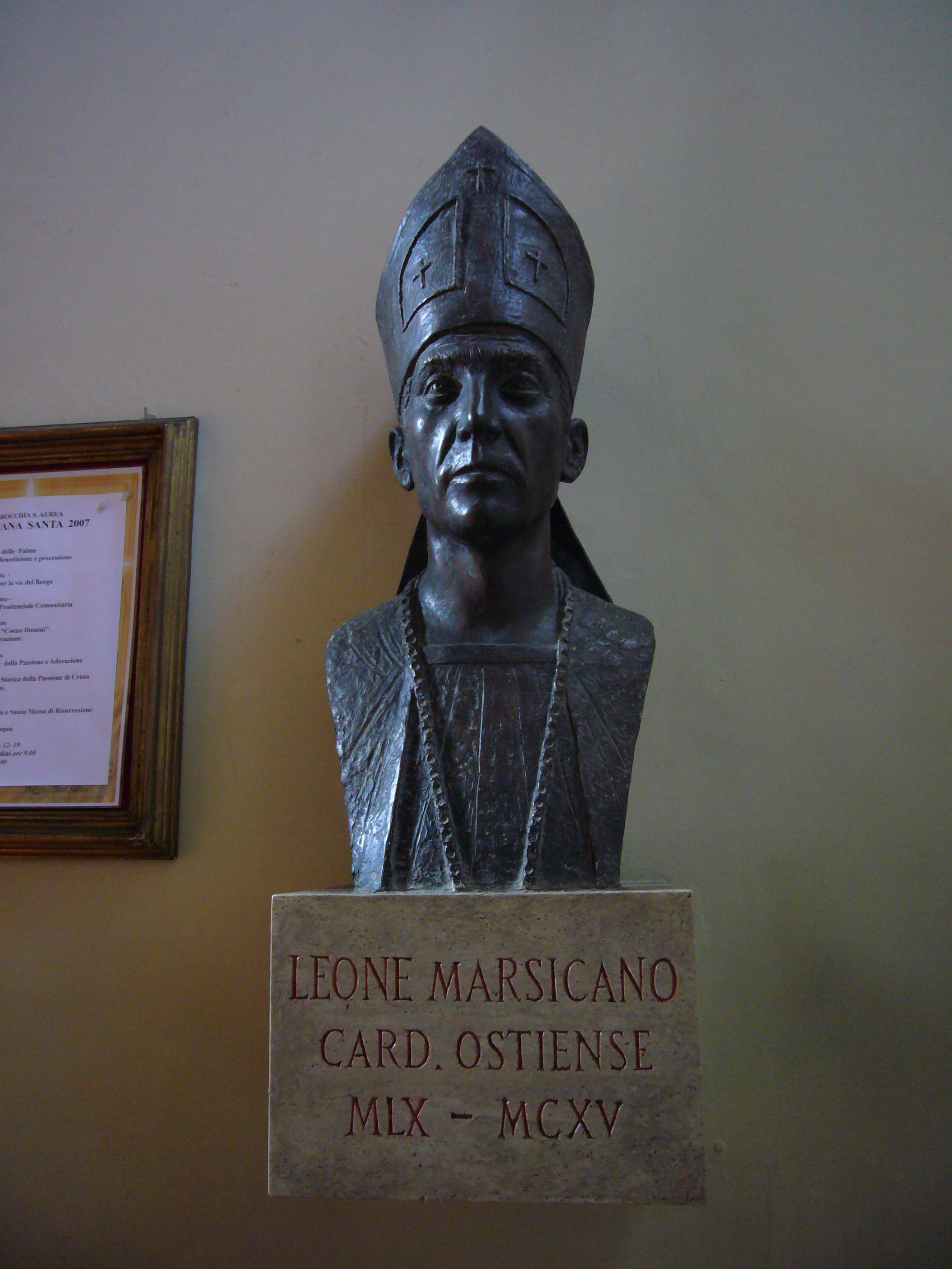 Roma, Ostia Antica: busto di Leone Marsicano, vescovo di Ostia (1101-1115)